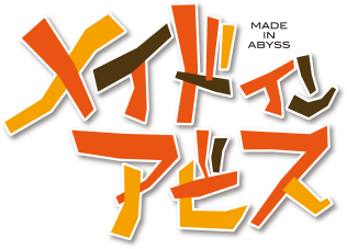 メイドインアビスのロゴマーク。